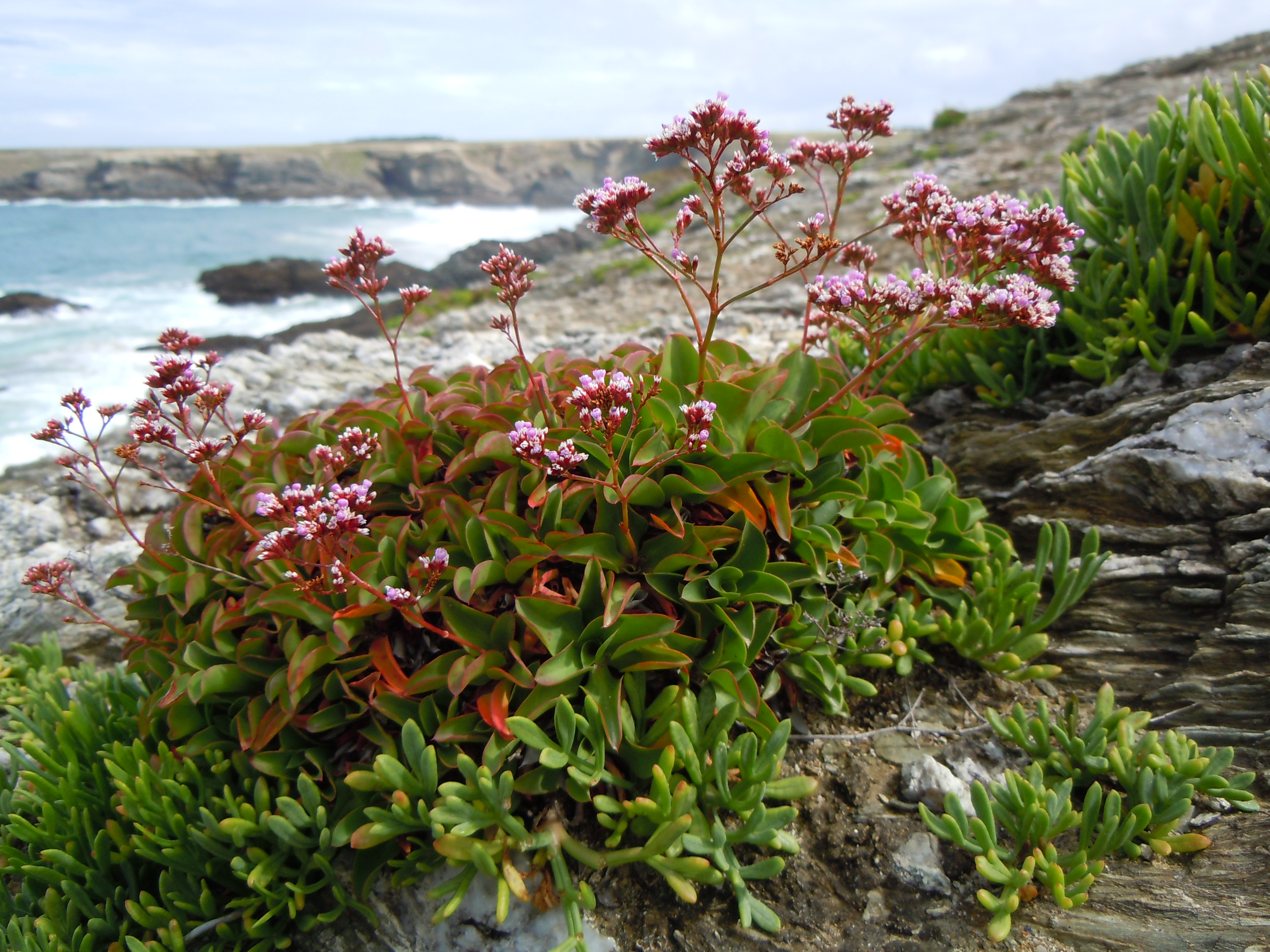 Statice à feuilles ovales : Limonium ovalifolium - Belle-Île-en-Mer - France